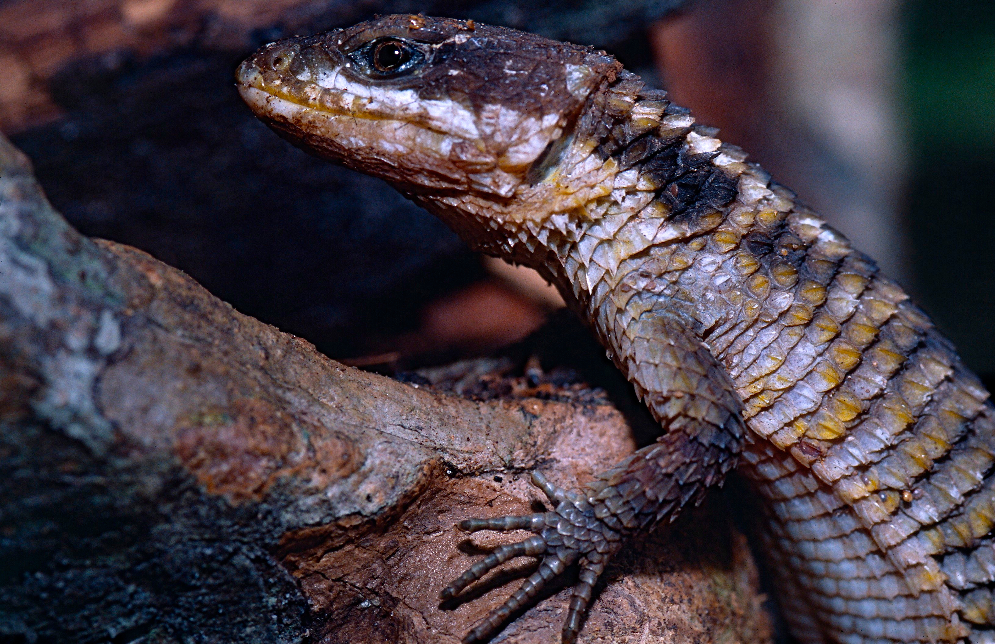 Arabuku-Sokoke Forest, Watamu, KENYA Scanned Slide from 2002